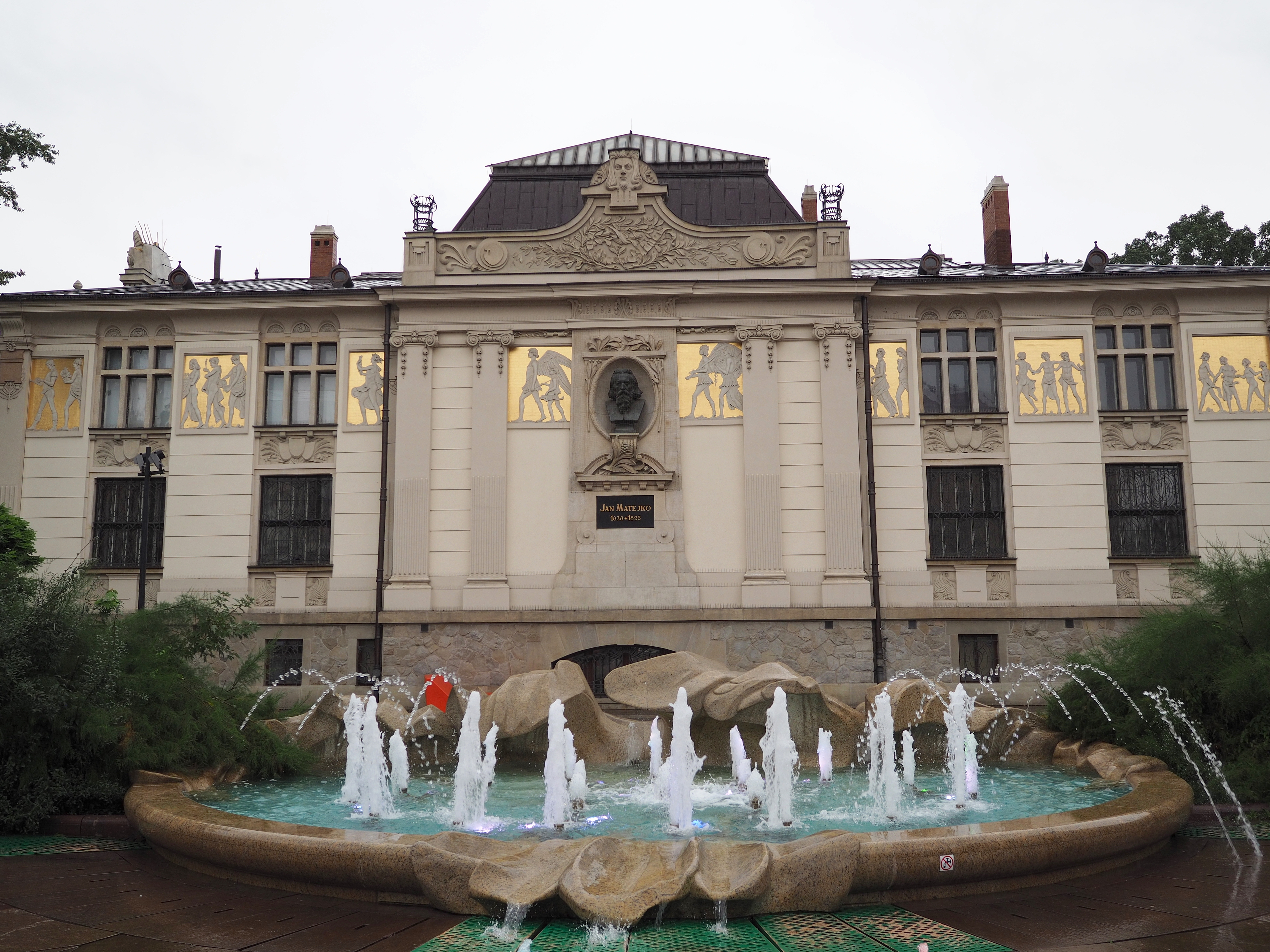 Kraków, Pałac Sztuki w Krakowie Wikidata has entry Q11814864 with data related to this item.